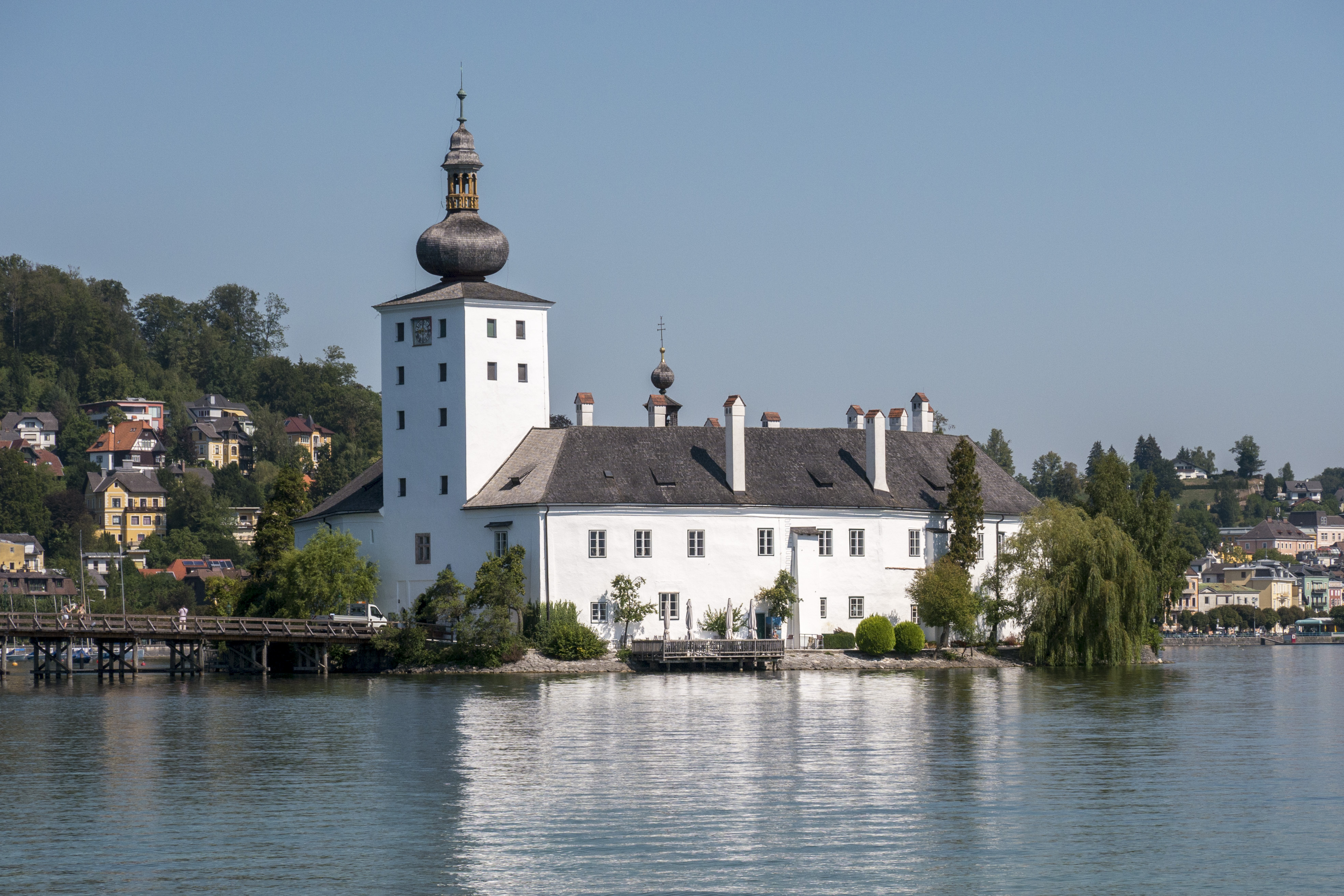 Seeschloß Orth samt Zugangsbrücke